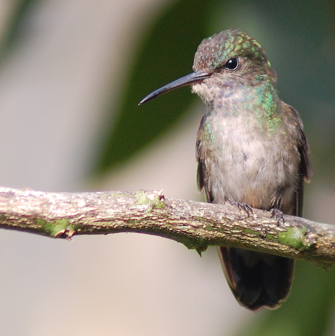 Female White-chinned Sapphire (Hylocharis cyanus). No jardim da minha sogra em Registro-SP (São Paulo, Brazil)